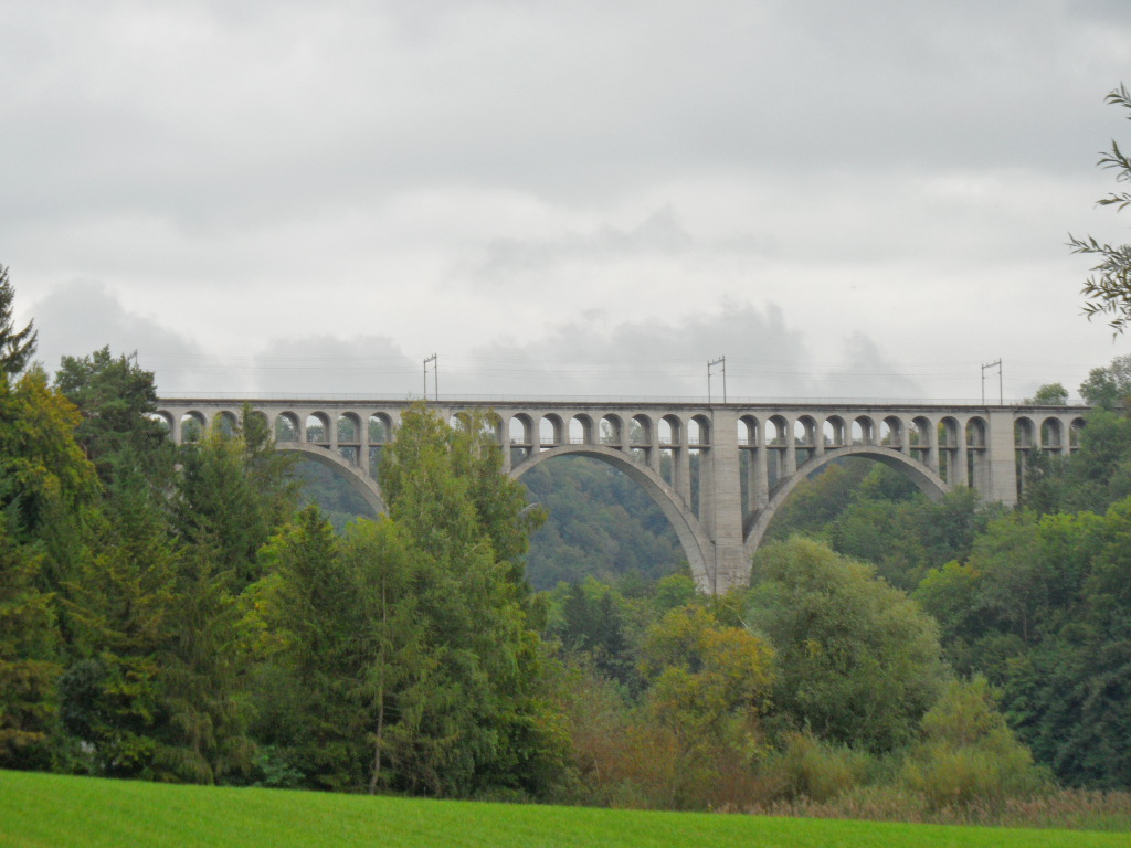 Grandfeybrücke